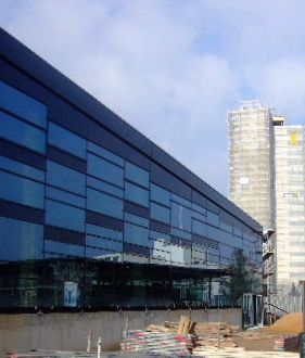 Baustelle des WCCB in Bonn – links das Kongressgebäude – im Hintergrund das Ameron World Conference Hotel